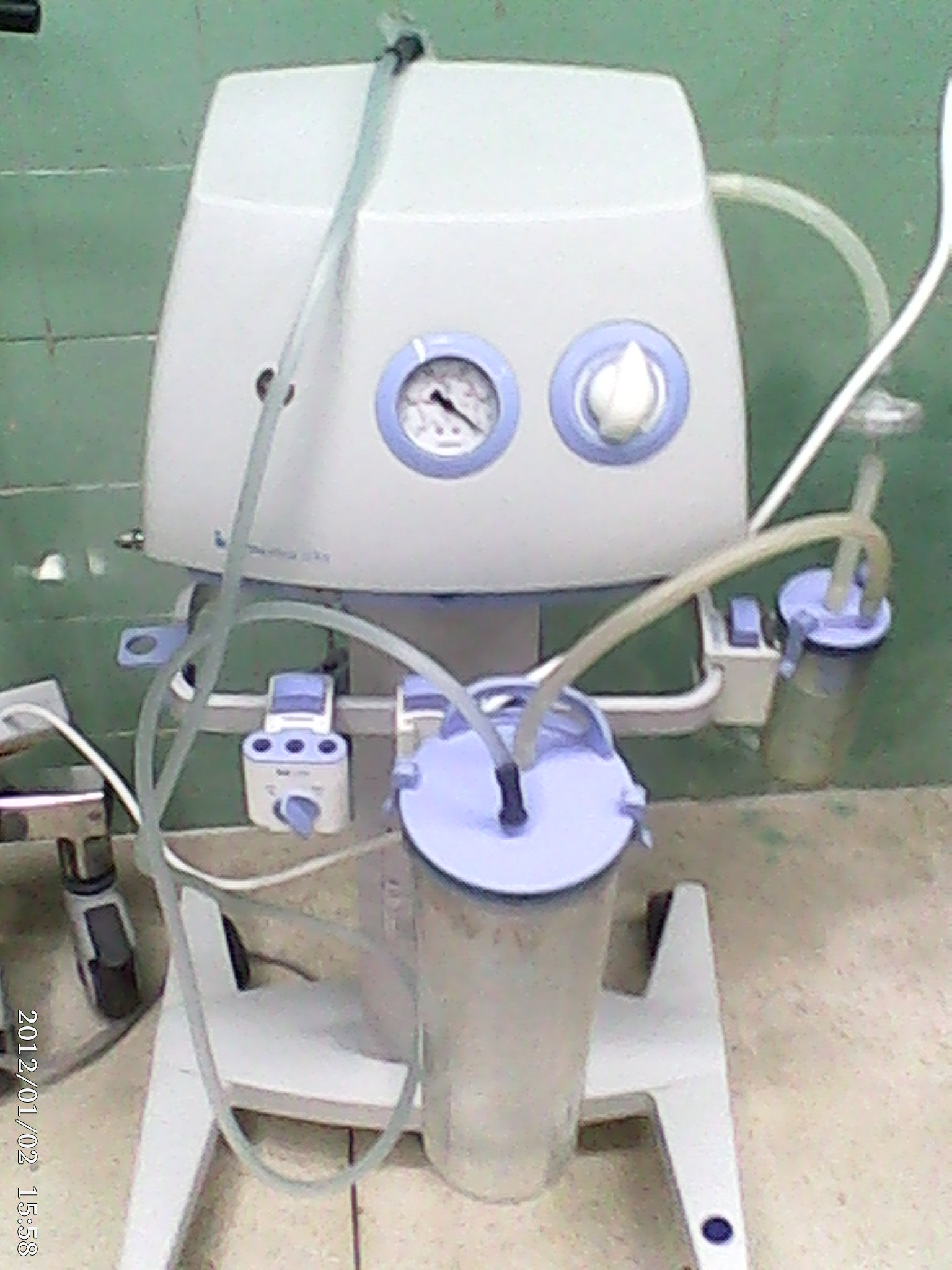 دستگاه آسپیراتور پرتابل اتاق عمل